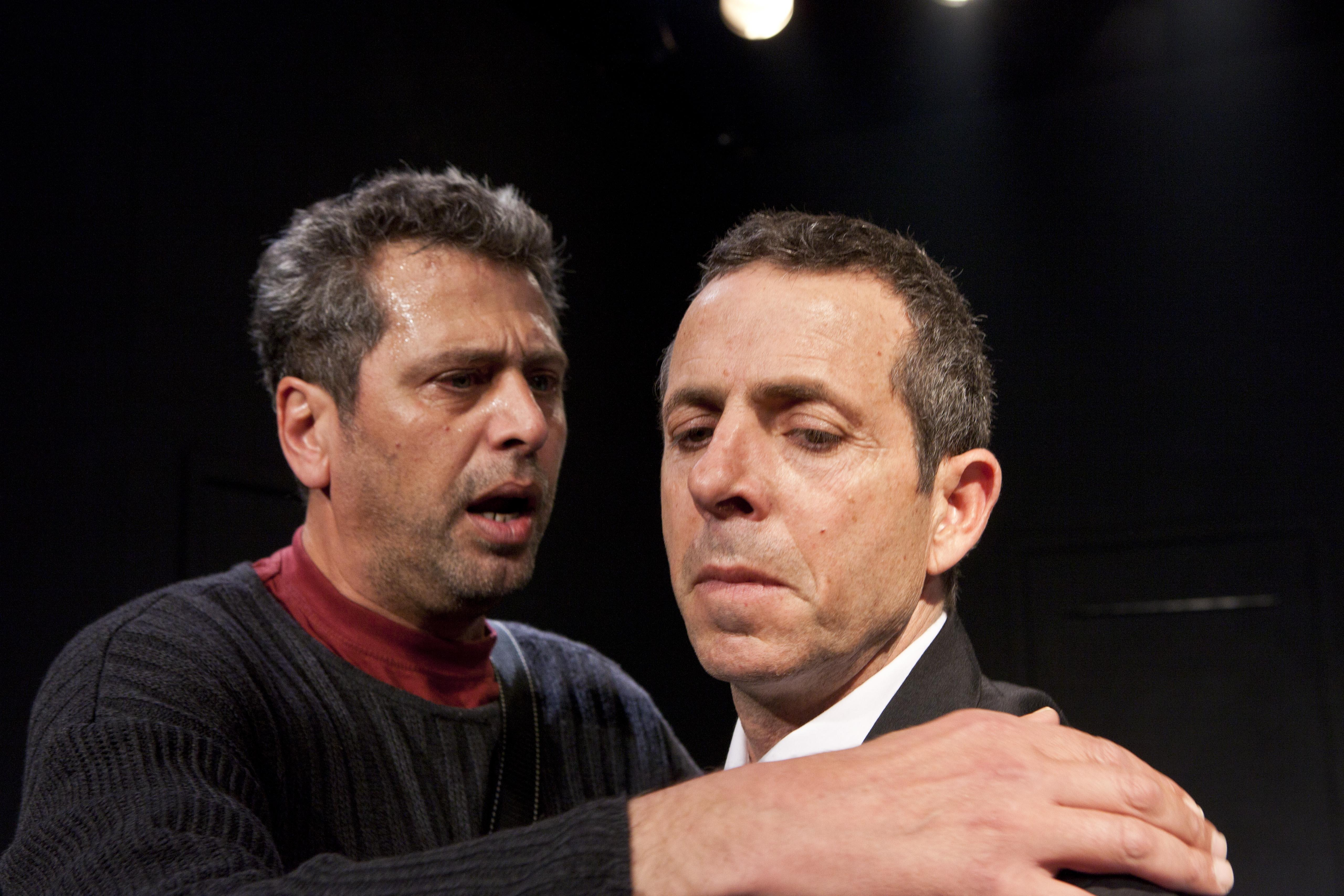 ח'ליפה נאטור ואיצ'ו אביטל בהצגה "יוליסס על בקבוקים", מאת גלעד עברון, בבימויה של אופירה הניג, תיאטרון חיפה